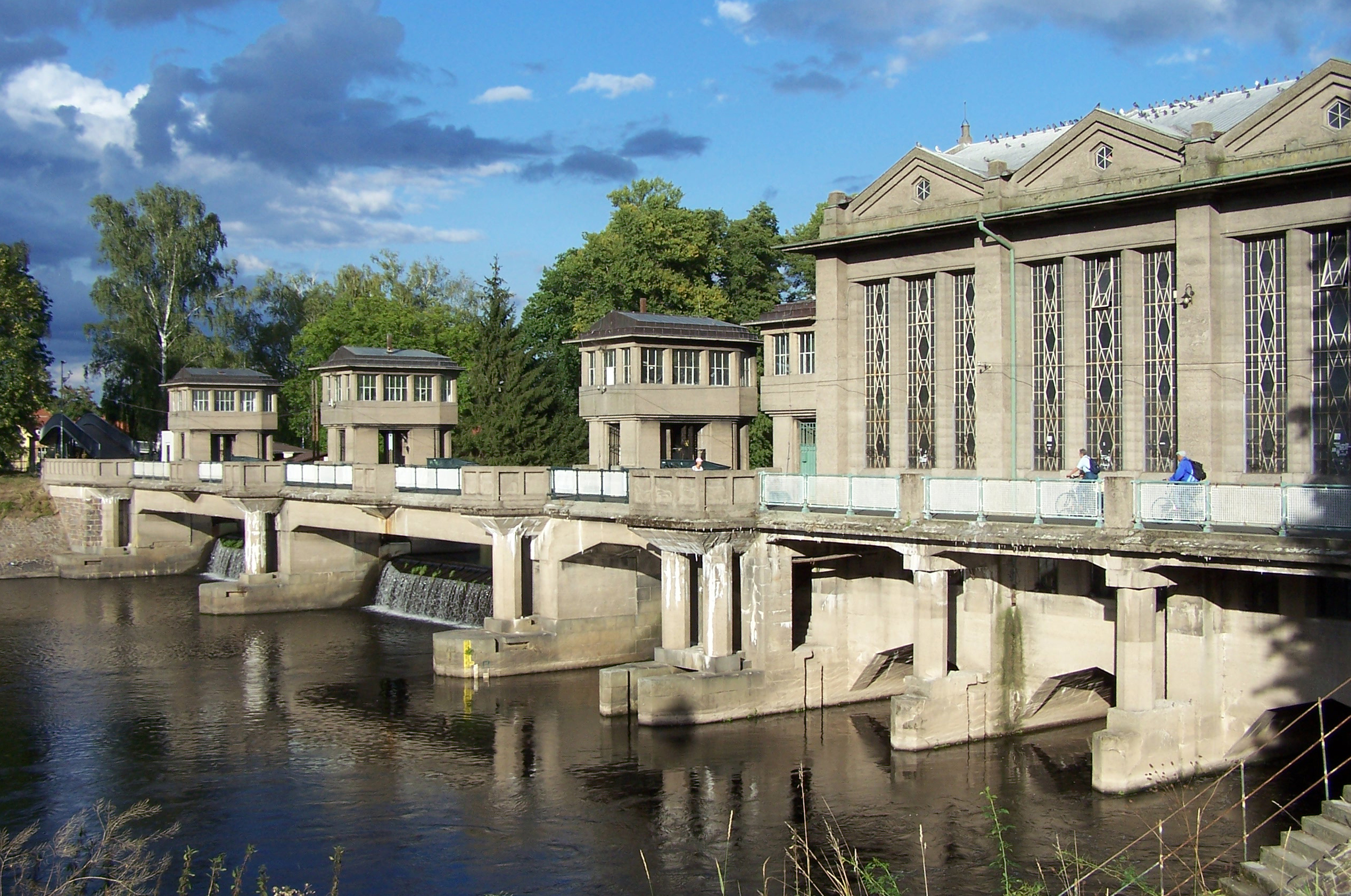 Antonín Engel - Zdymadlo a vodní elektrárna v Poděbradech.